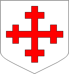 d'argent à la croix recroisettée de gueules